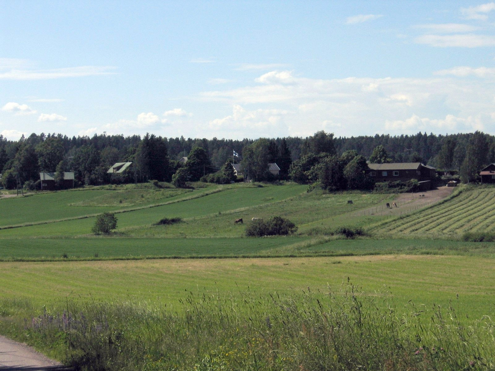 Sotunki/Sottungsby village in Vantaa, Finland